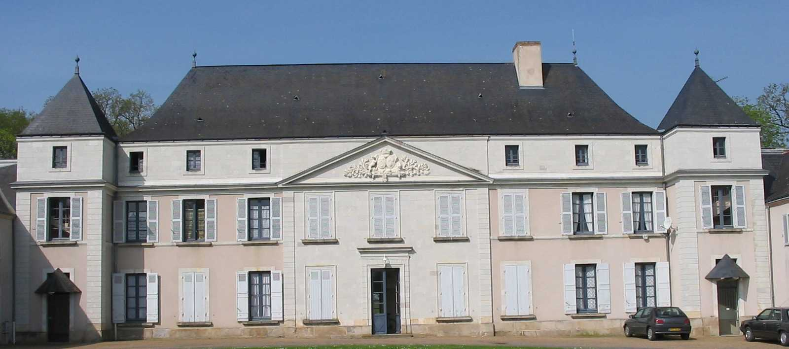 château de la Villenière à la Pouèze